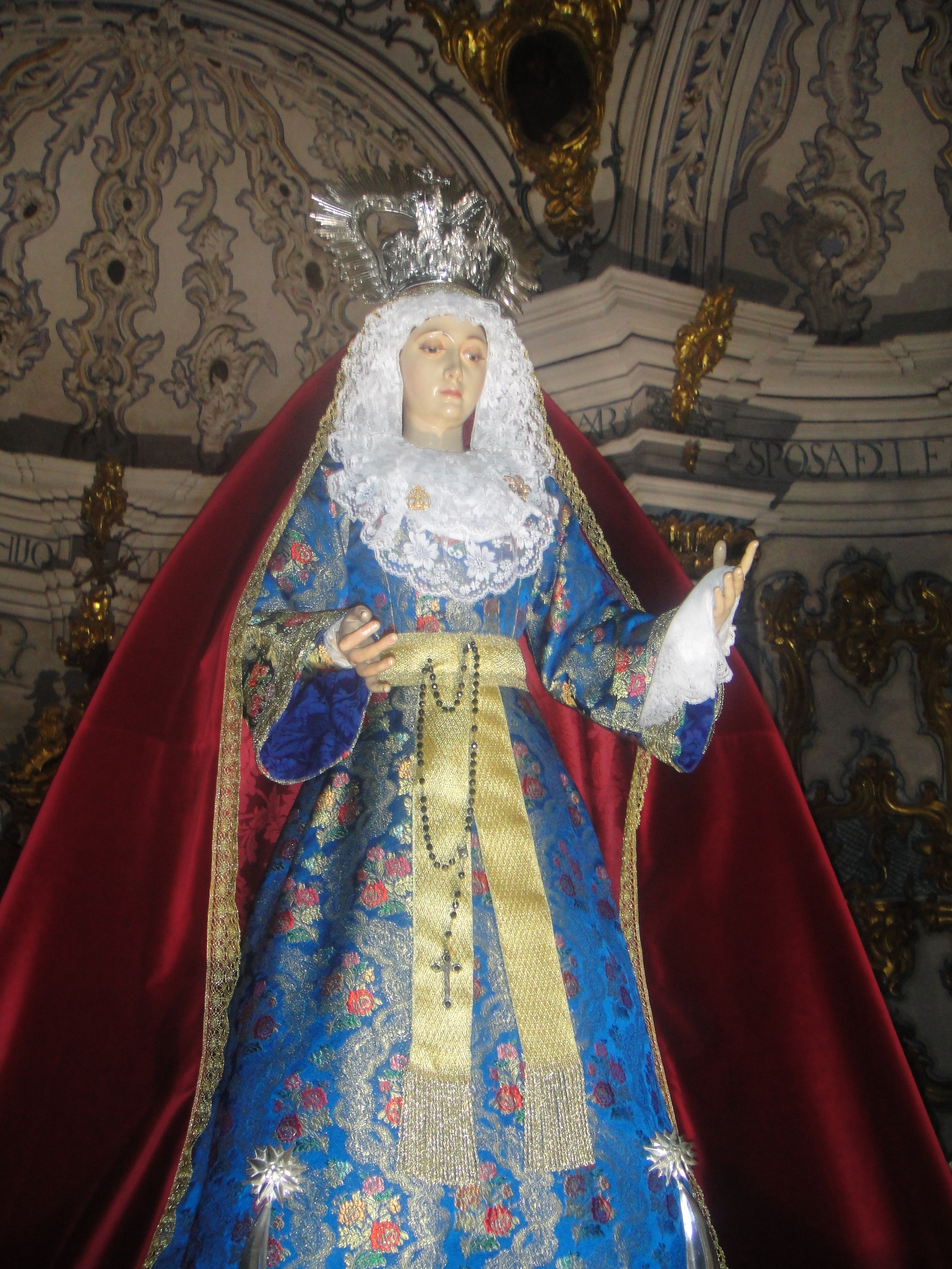 Imagen de Ntra. Sra. de la Esperanza. Retablo mayor de la iglesia de San Francisco de Fuente Obejuna.